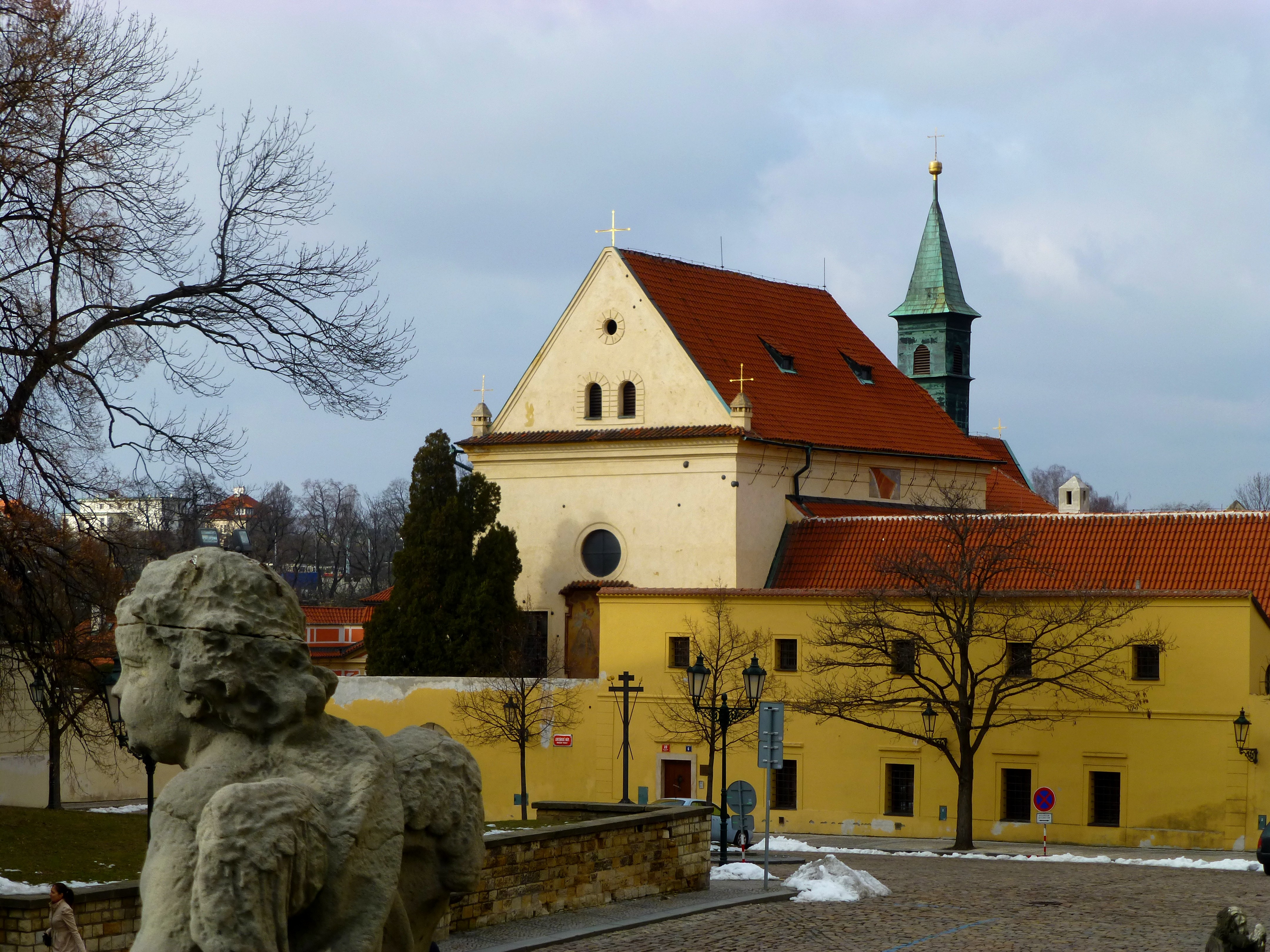 Prag – Kleine Kapelle neben der Wallfahrtsstätte Loreto - Malá kaple vedle svatyně Loreto